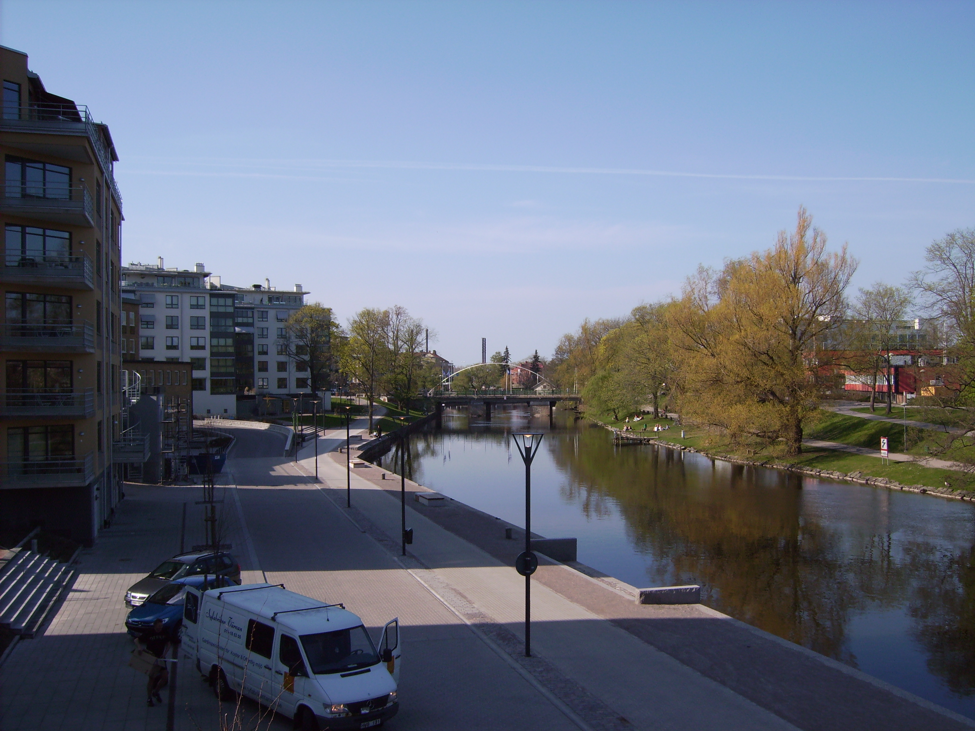 Stångån norrut, sedd från Drottningbron, Linköping.